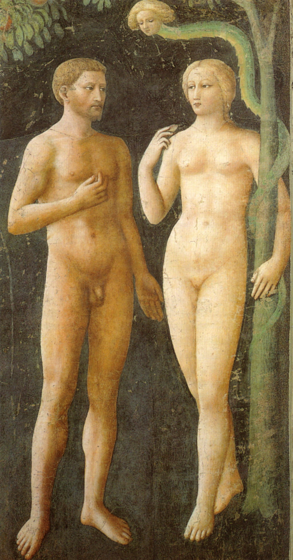 after restauration